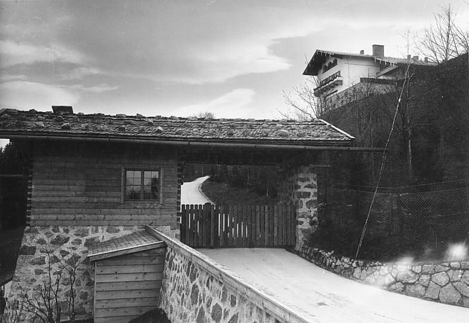 Obersalzberg, Berghof von Adolf Hitler Berchtesgaden "Der Berghof" auf dem Obersalzberg, das Haus des Führers (rechts oben). Im Vordergrund die Haupteinfahrt. (Phot. Hoffmann)